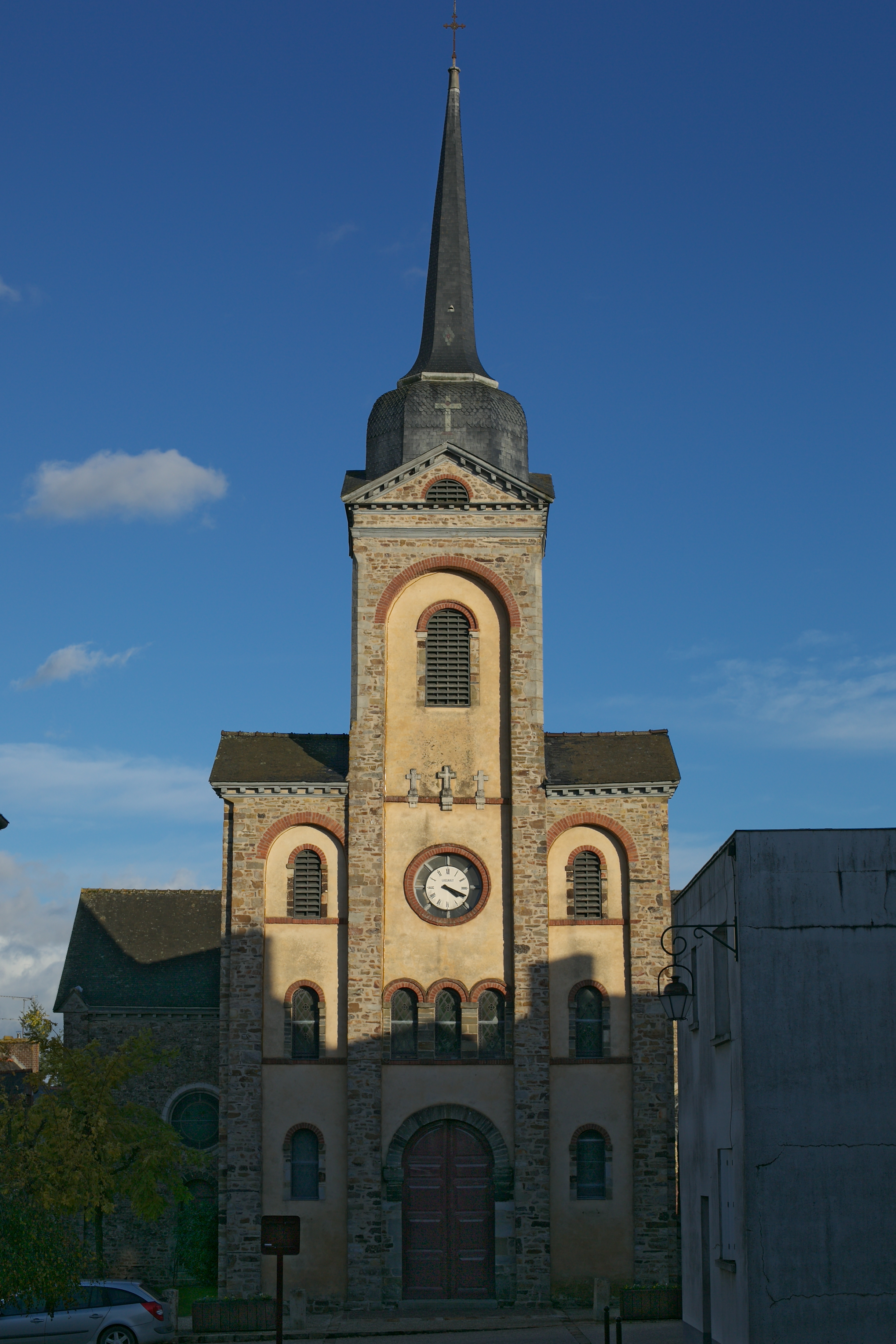 Église Saint-Martin de Tresbœuf.